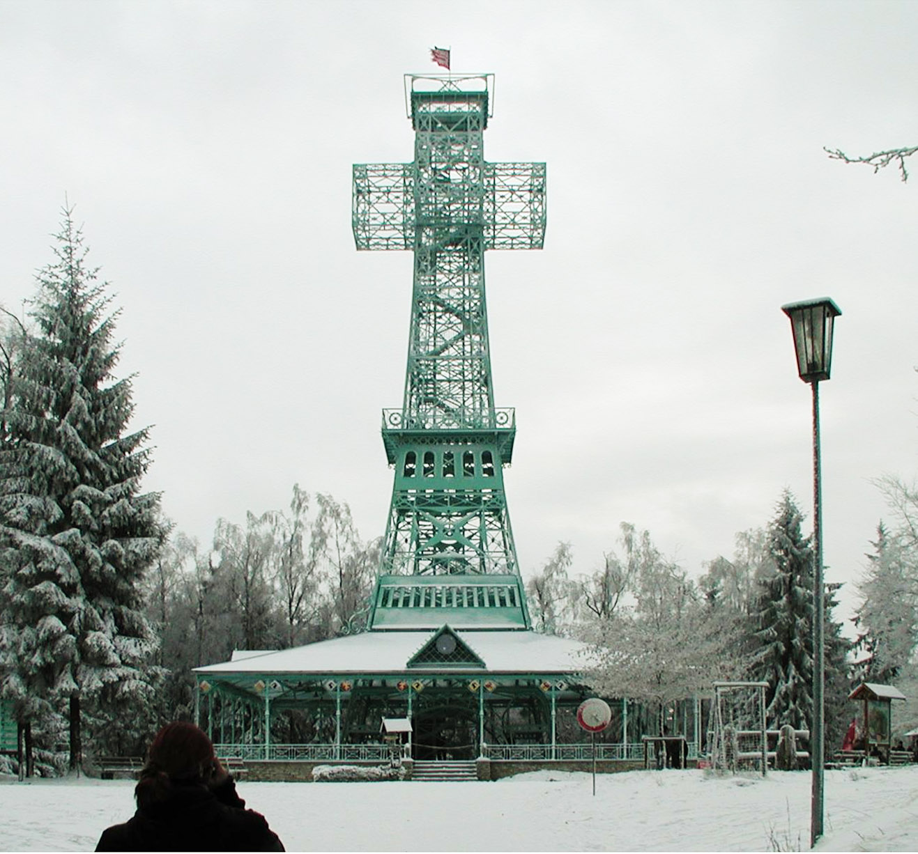 Das Josephskreuz auf dem Auerberg im Harz.